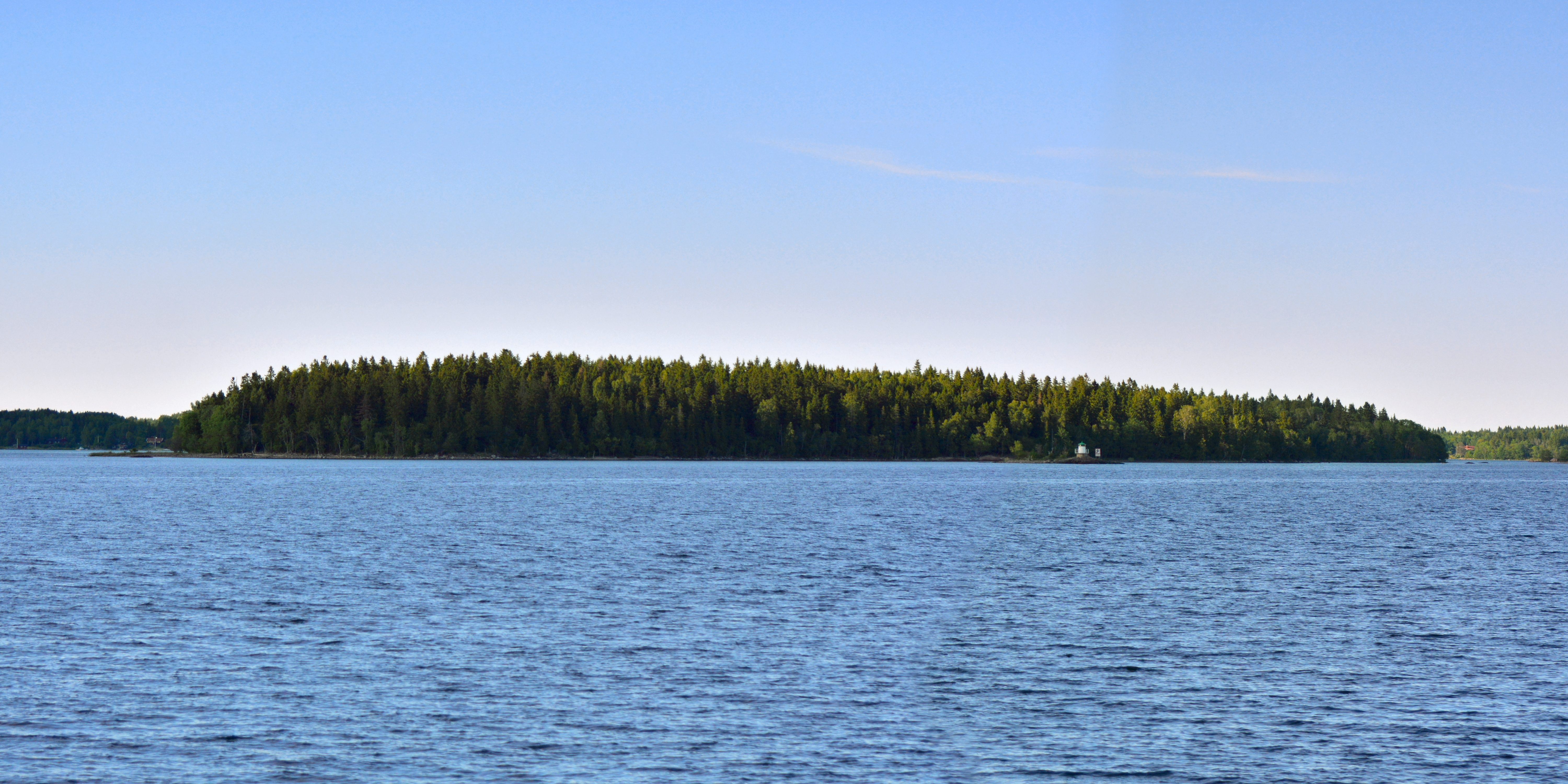 Ön Ålandet söder om Rådmansö i Stockholms norra skärgård.